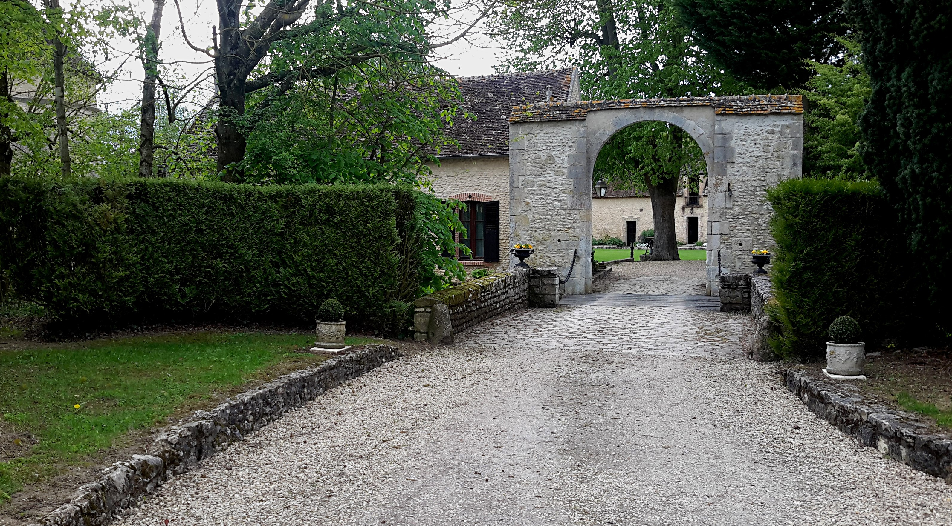 Entrée du parc du château de la Planchette (XIIème siècle)